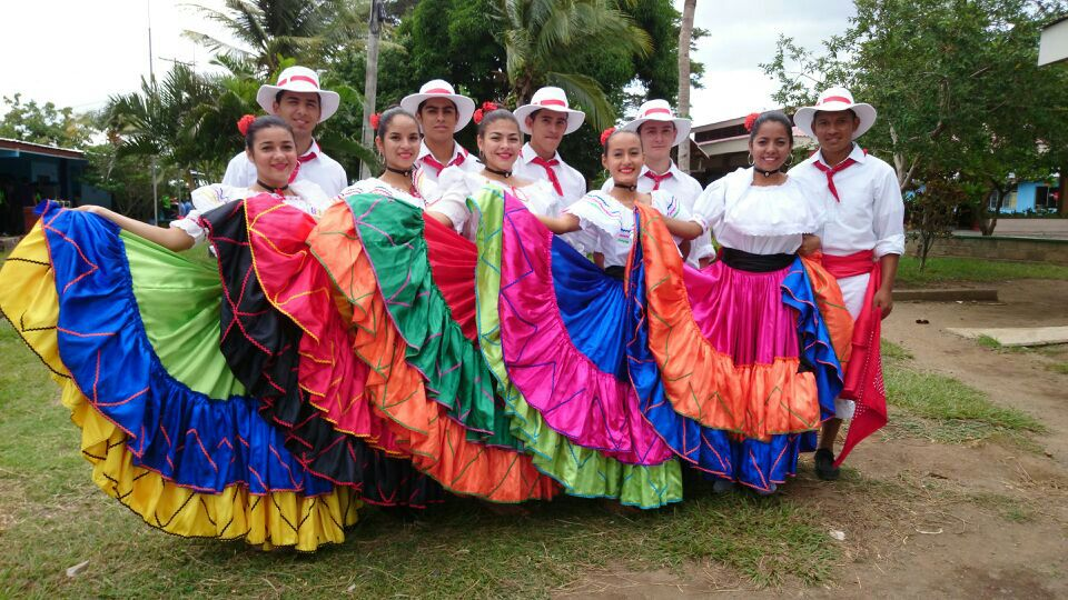 Trajes folclóricos de Costa Rica durante la celebración de la anexión del Partido de Nicoya (25 de julio).